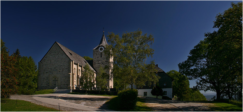 Pfarrkirche St. Gotthard in Kirchberg im Wald